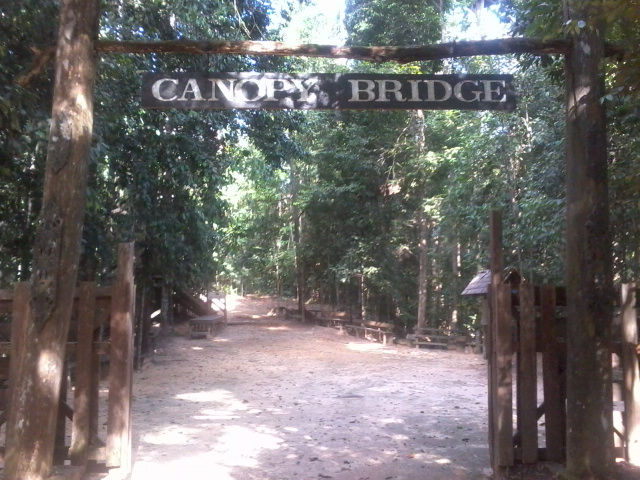 canopy bridge